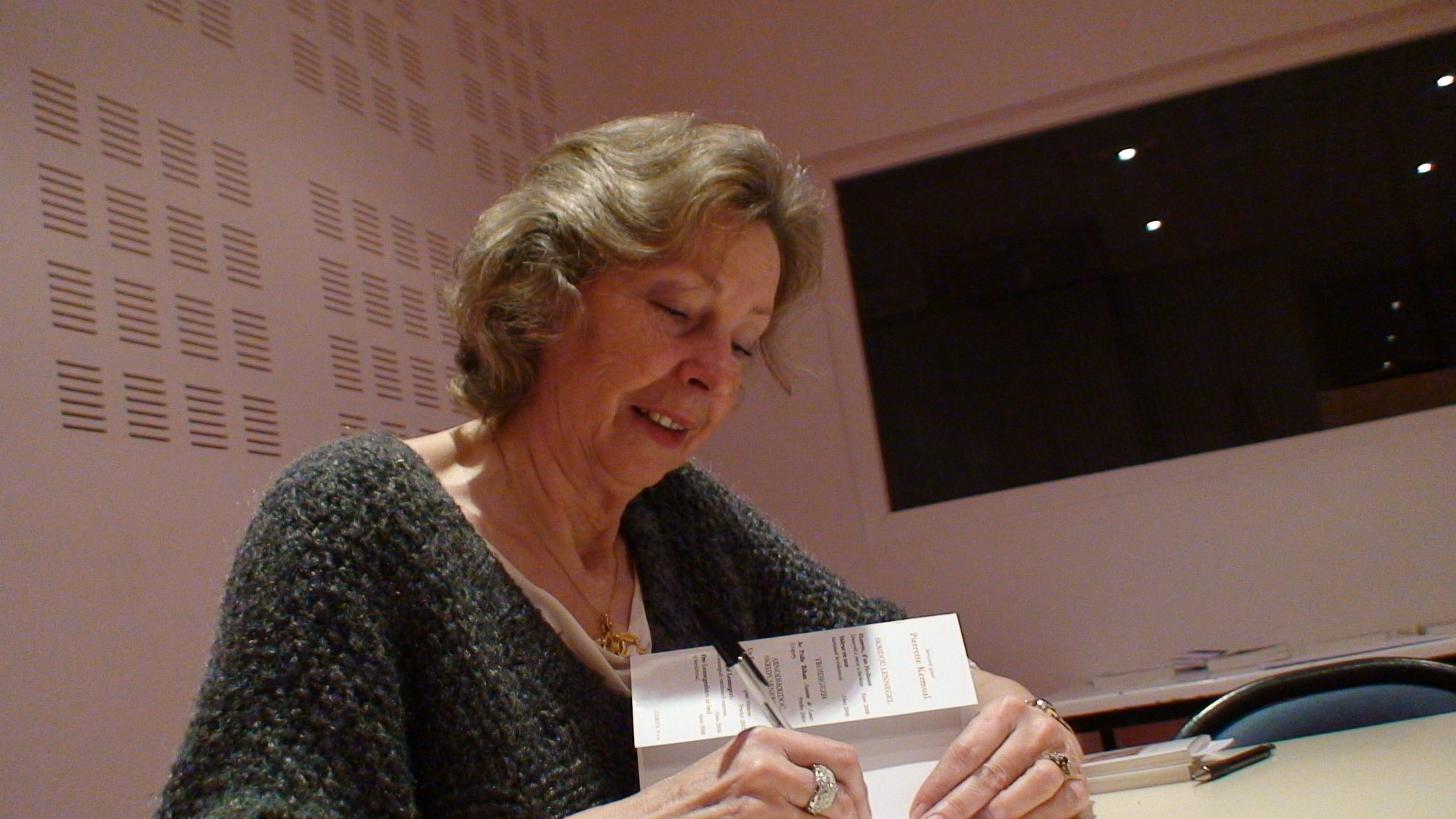 Pierrette Kermoal, skrivagnerez ha renerezh ar gelaouenn Aber.